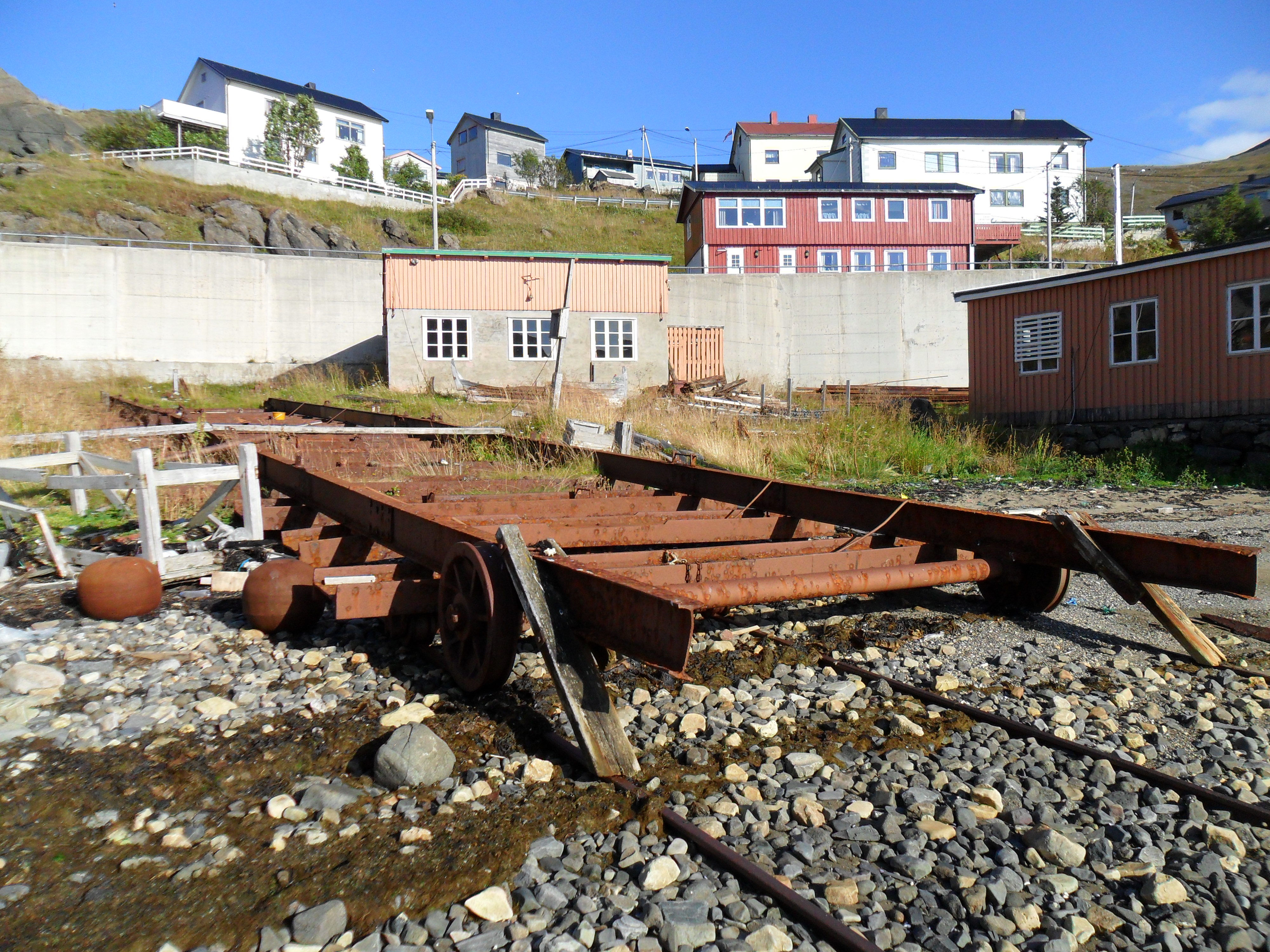 Fra Storbukt i Nordkapp kommune, Finnmark. Fra oppbyggningen av Finnmark efter krigen.